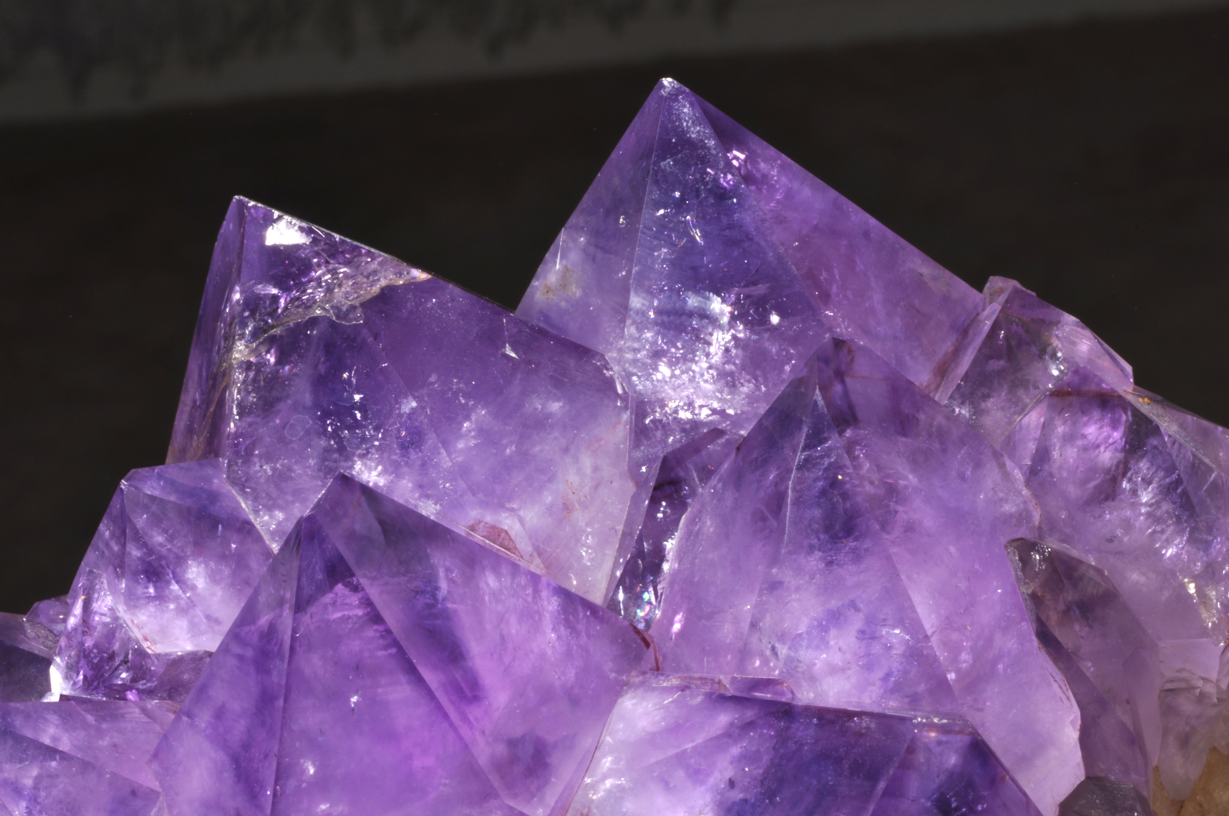 Amethystkristalle